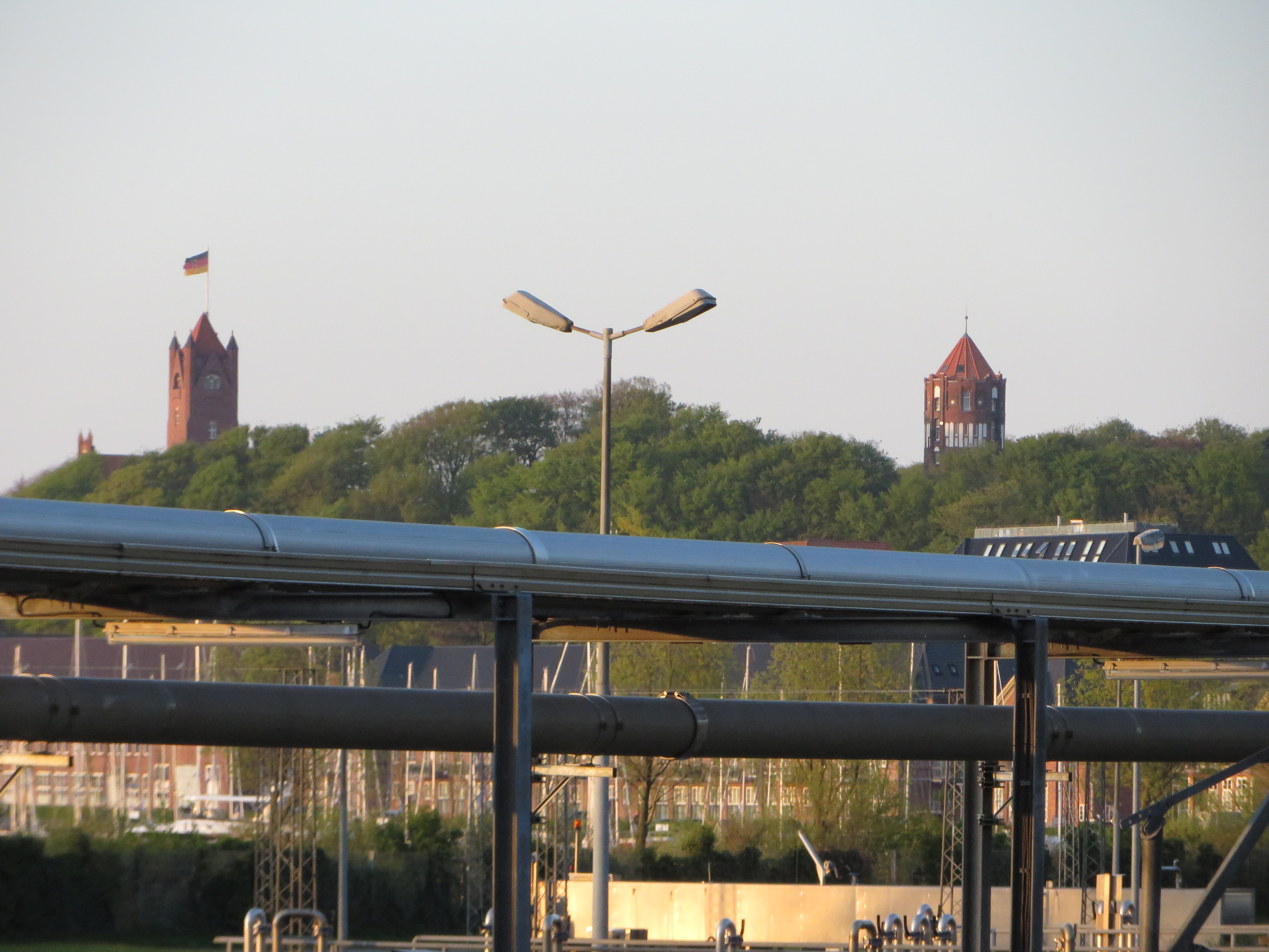 Kläranlage mit Marineburg im Hintergrund (Flensburg 2014), Bild 03